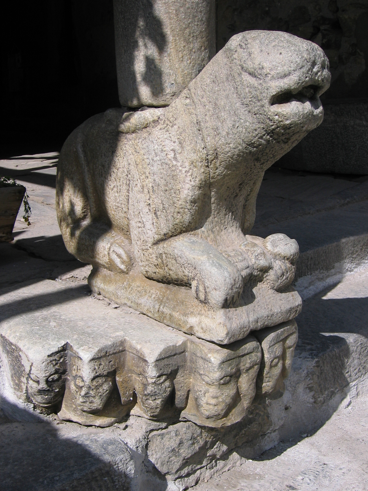 Saint-Véran, Hautes-Alpes, France